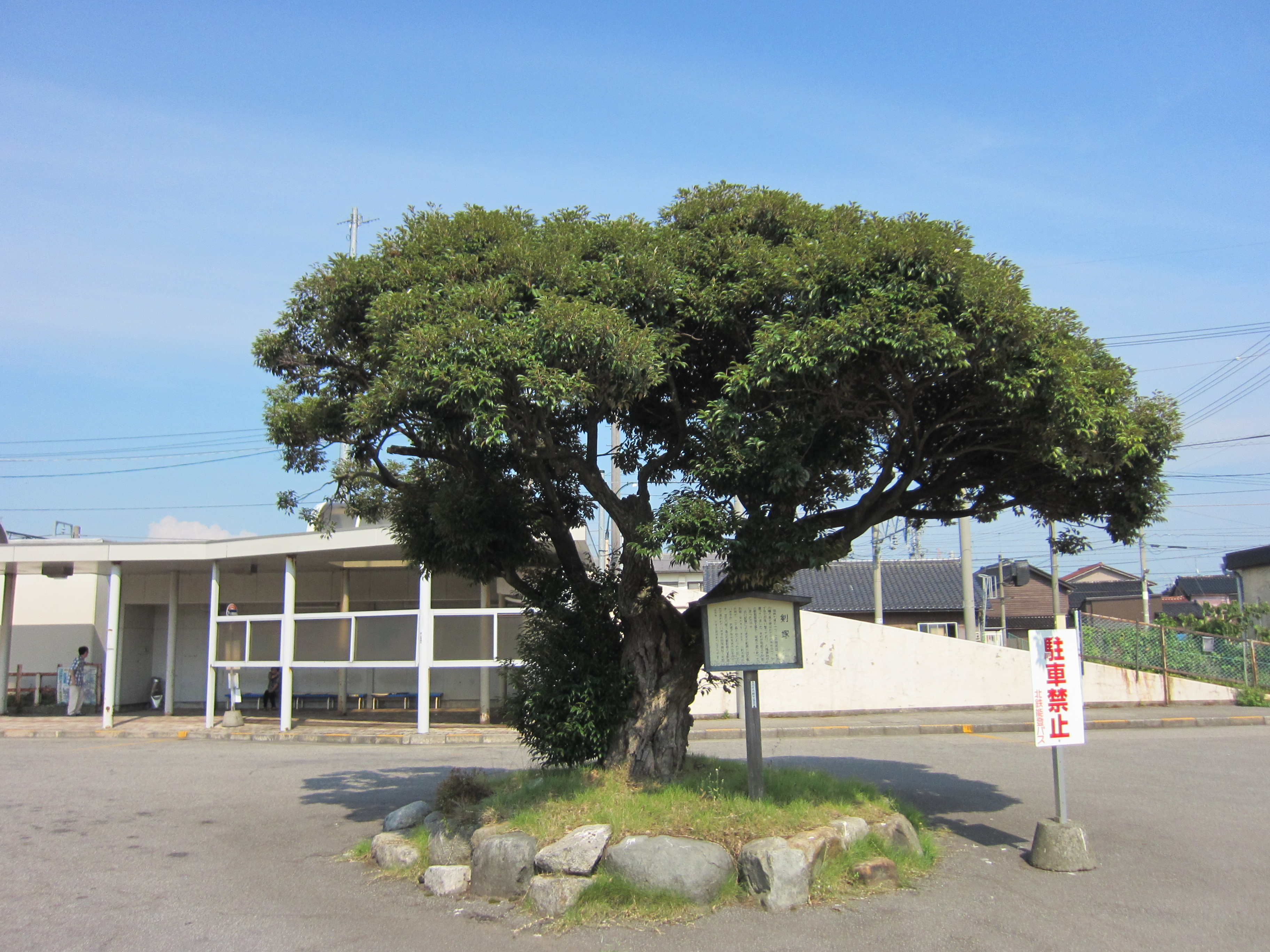 剣塚 (羽咋七塚)